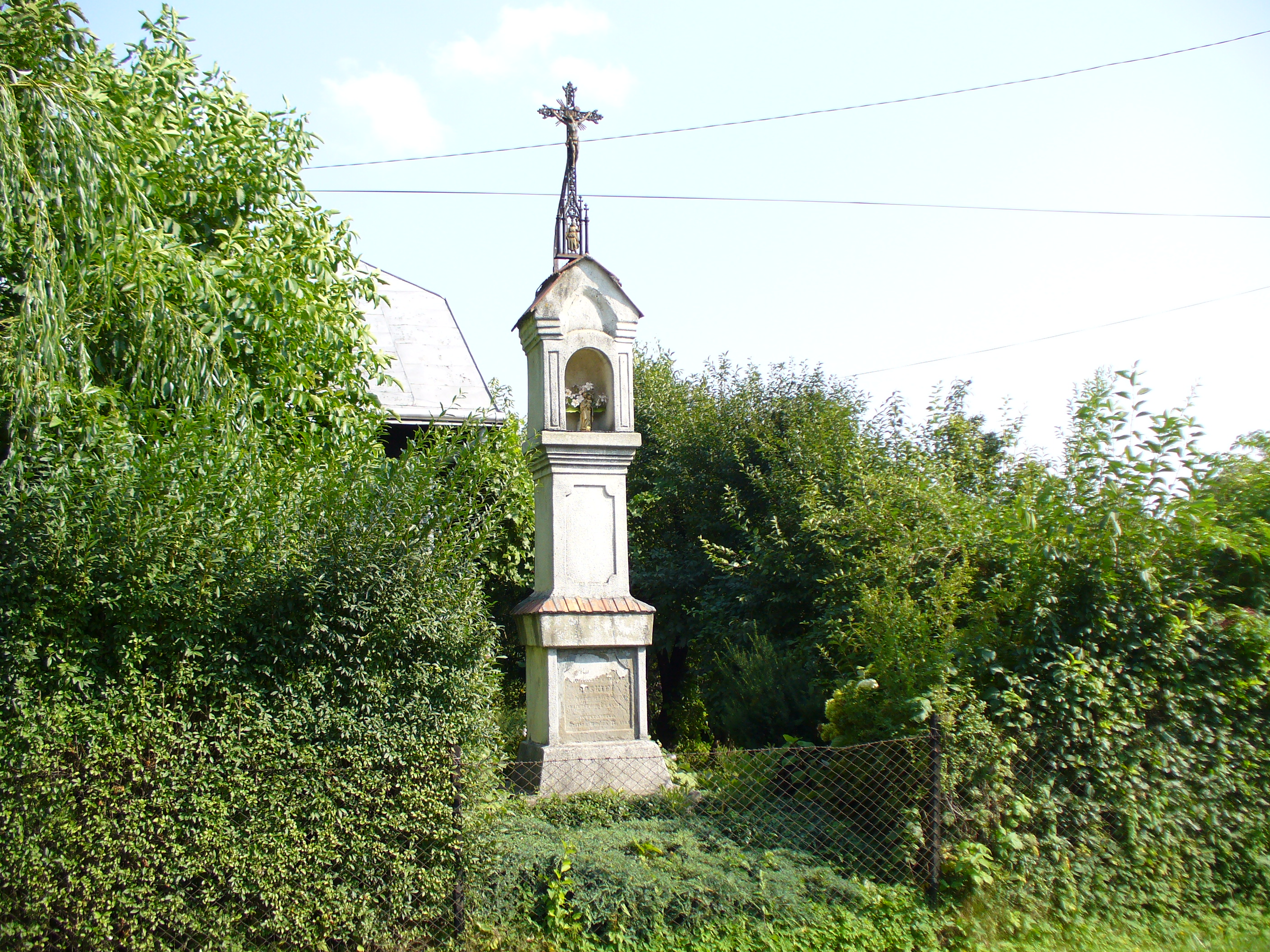 Besko